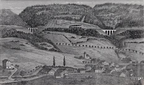 Saint-Sulpice, ligne ferroviaire Franco-SuisseTechnique: Gravure sur bois, xylographie